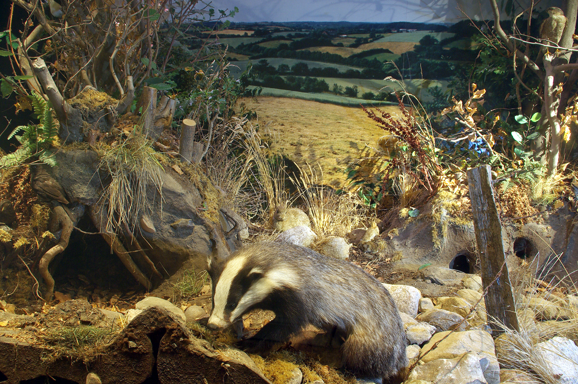 Vielfältiges Leben im Knick